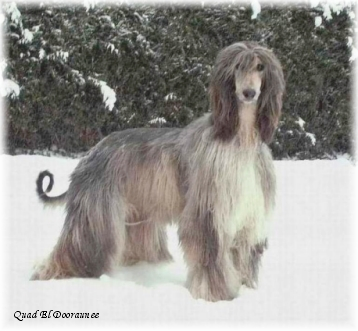 Lévrier afghan mâle Quad El Dooraunee